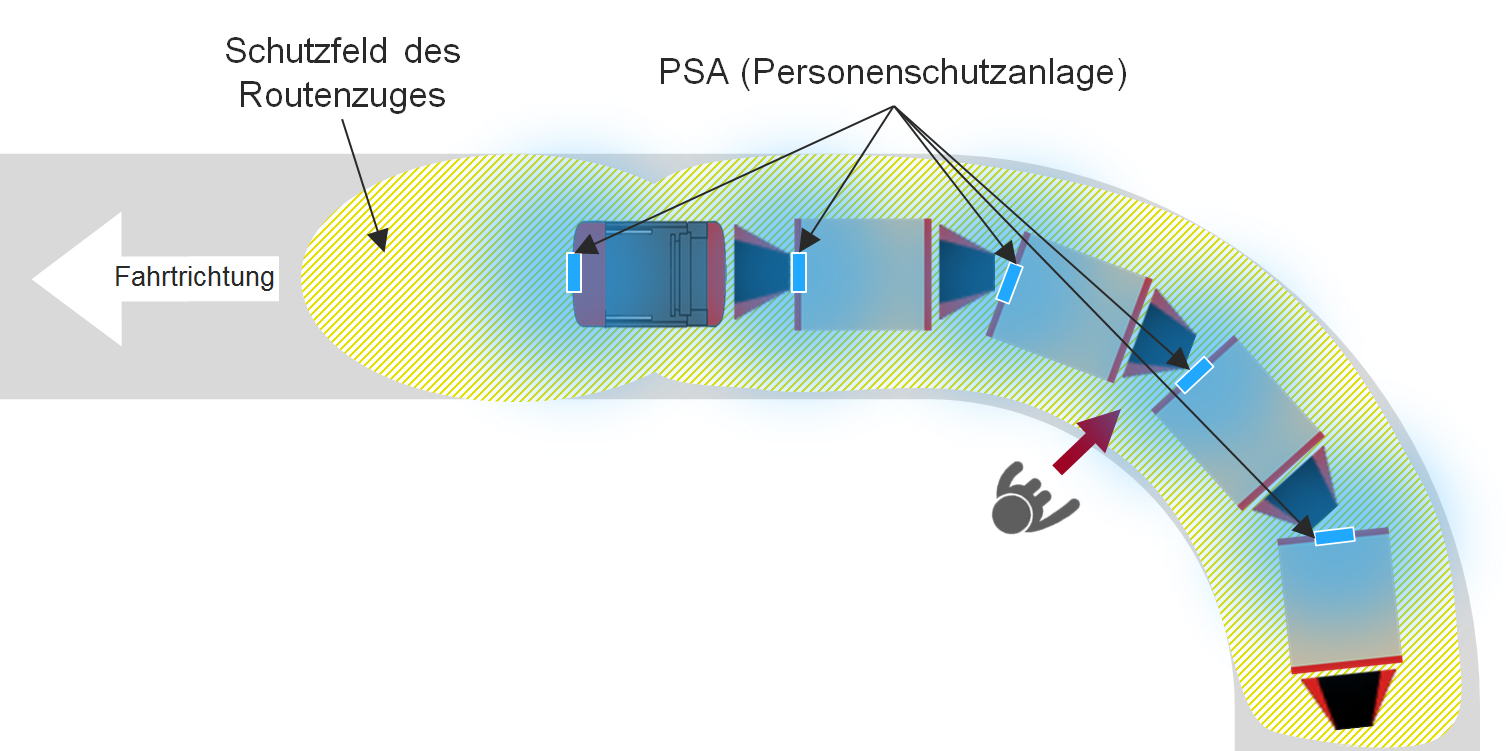 Personenschutzanlage (PSA) bei automatisierten Routenzügen: Komplettüberwachung des gesamten Routenzug-Umfeldes.